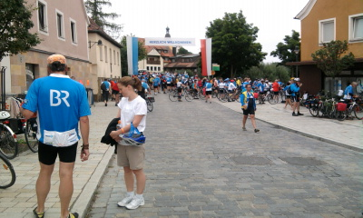 BR Radltour am 5. August 2010 in Pleinfeld